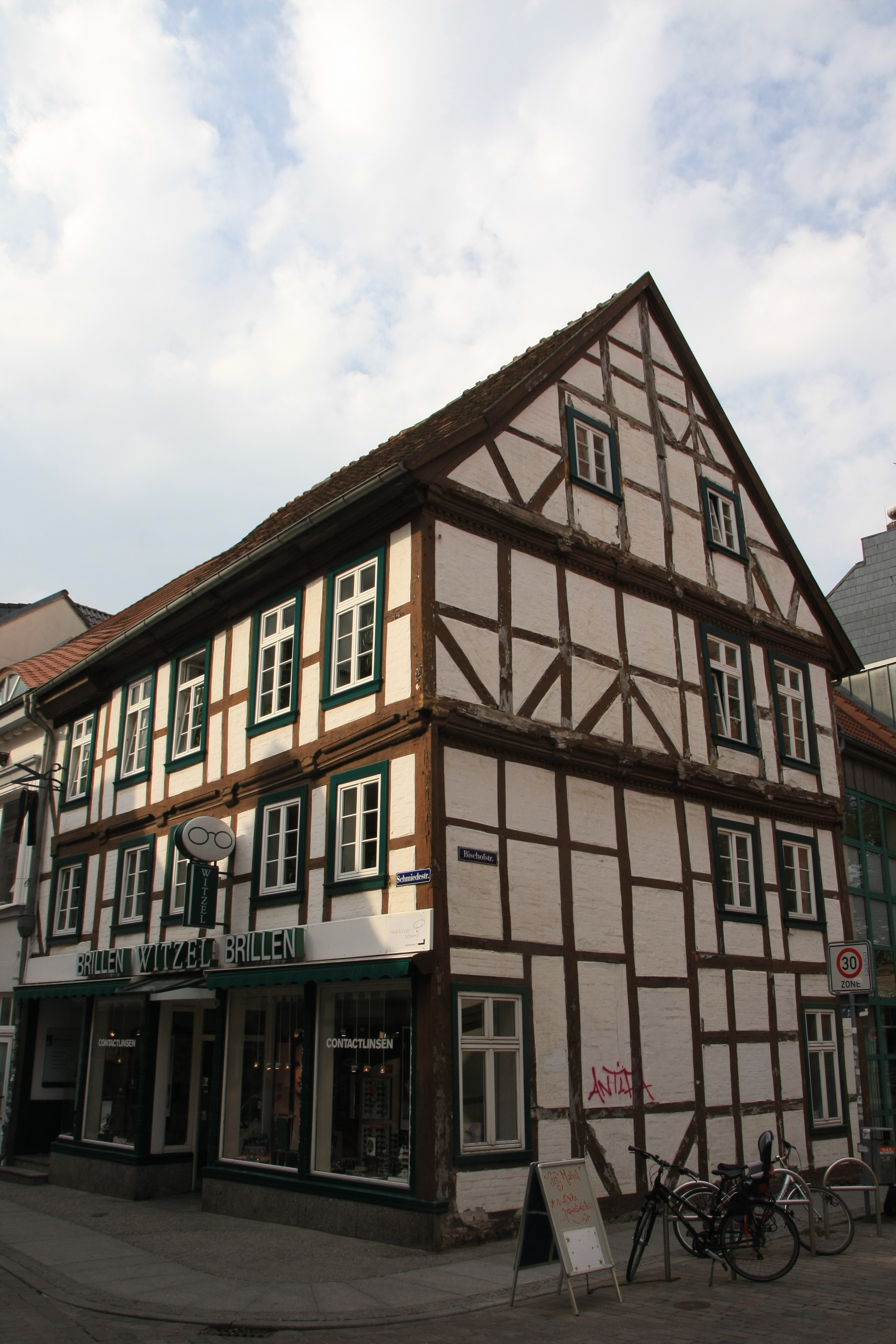 19053 Schwerin, Schmiedestraße 15